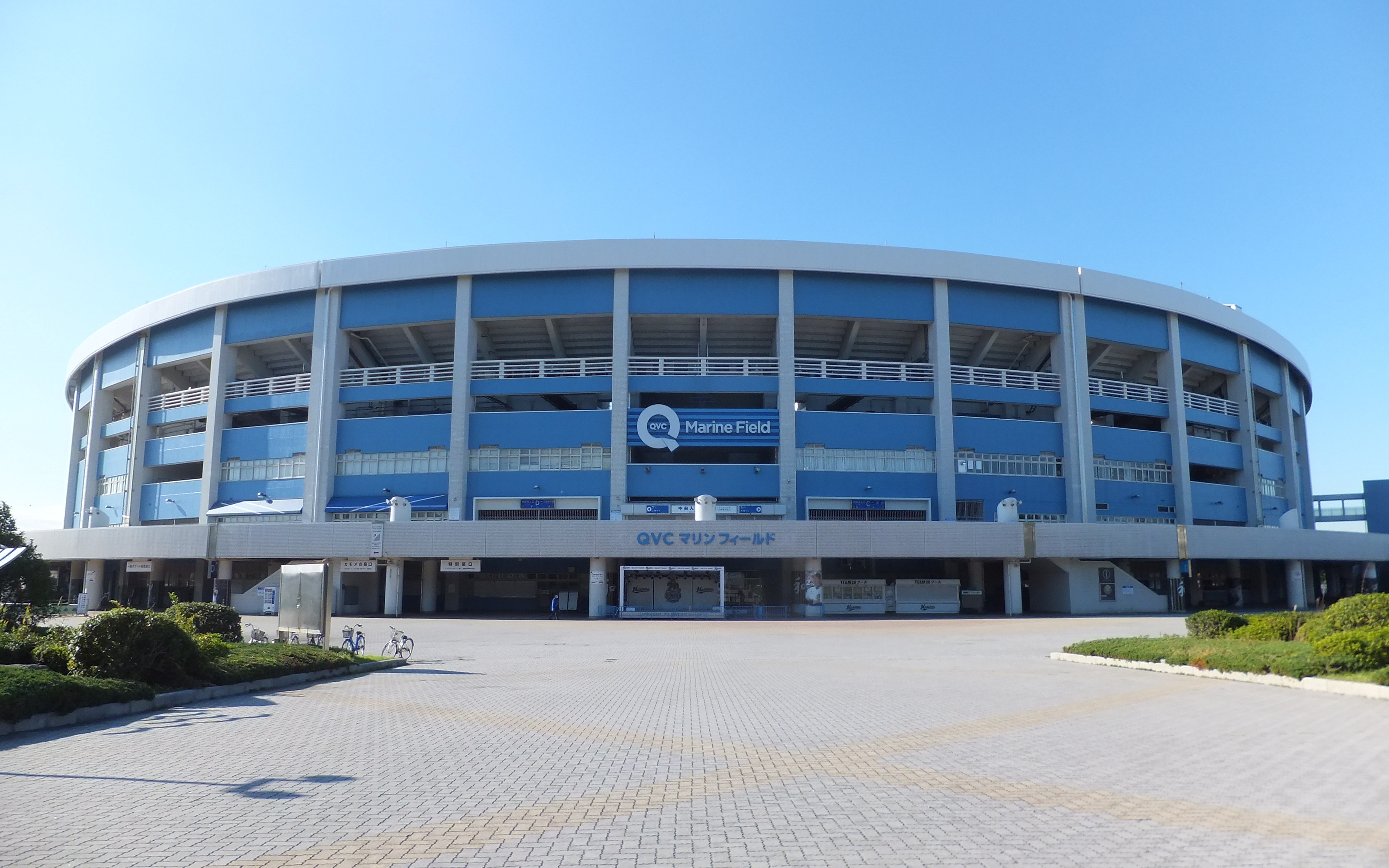 千葉ロッテマリーンズの本拠地QVCマリンフィールド